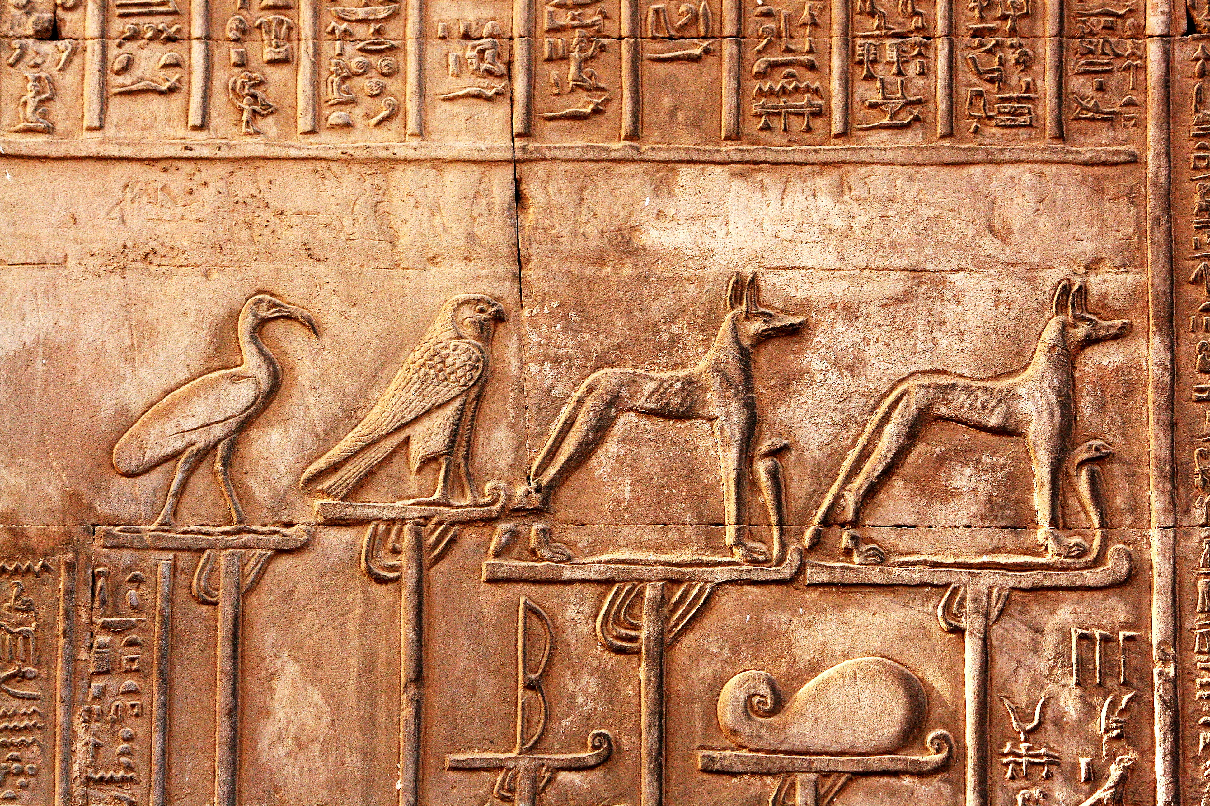 Tempel von Kom Ombo